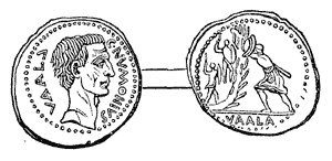 Ancient Roman coin depicting C. Numonius Vala.